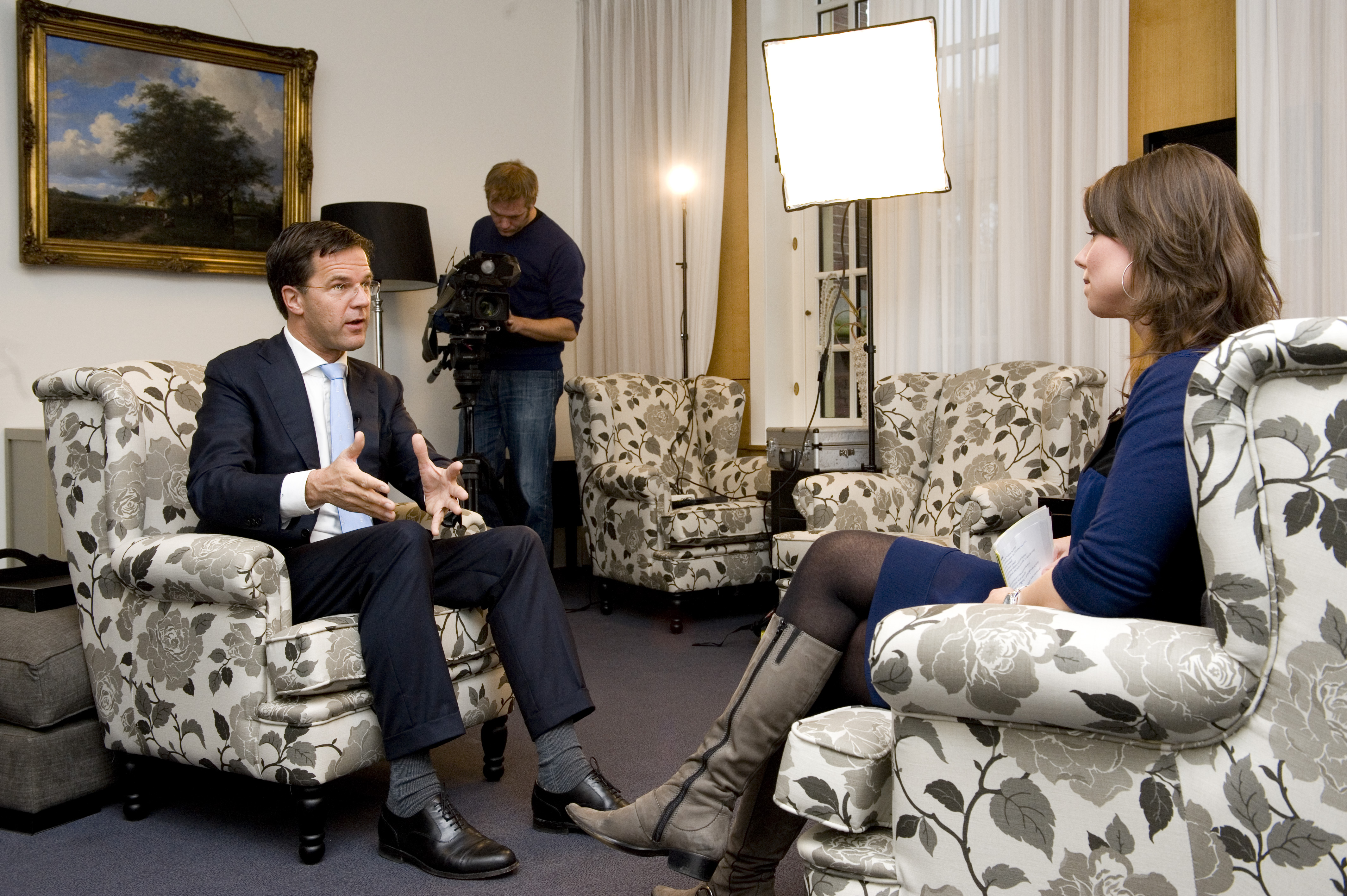 09-11-2010. Rozemarijn ("Roos") Moggré van het Jeugdjournaal interviewt minister-president Rutte in het Torentje.